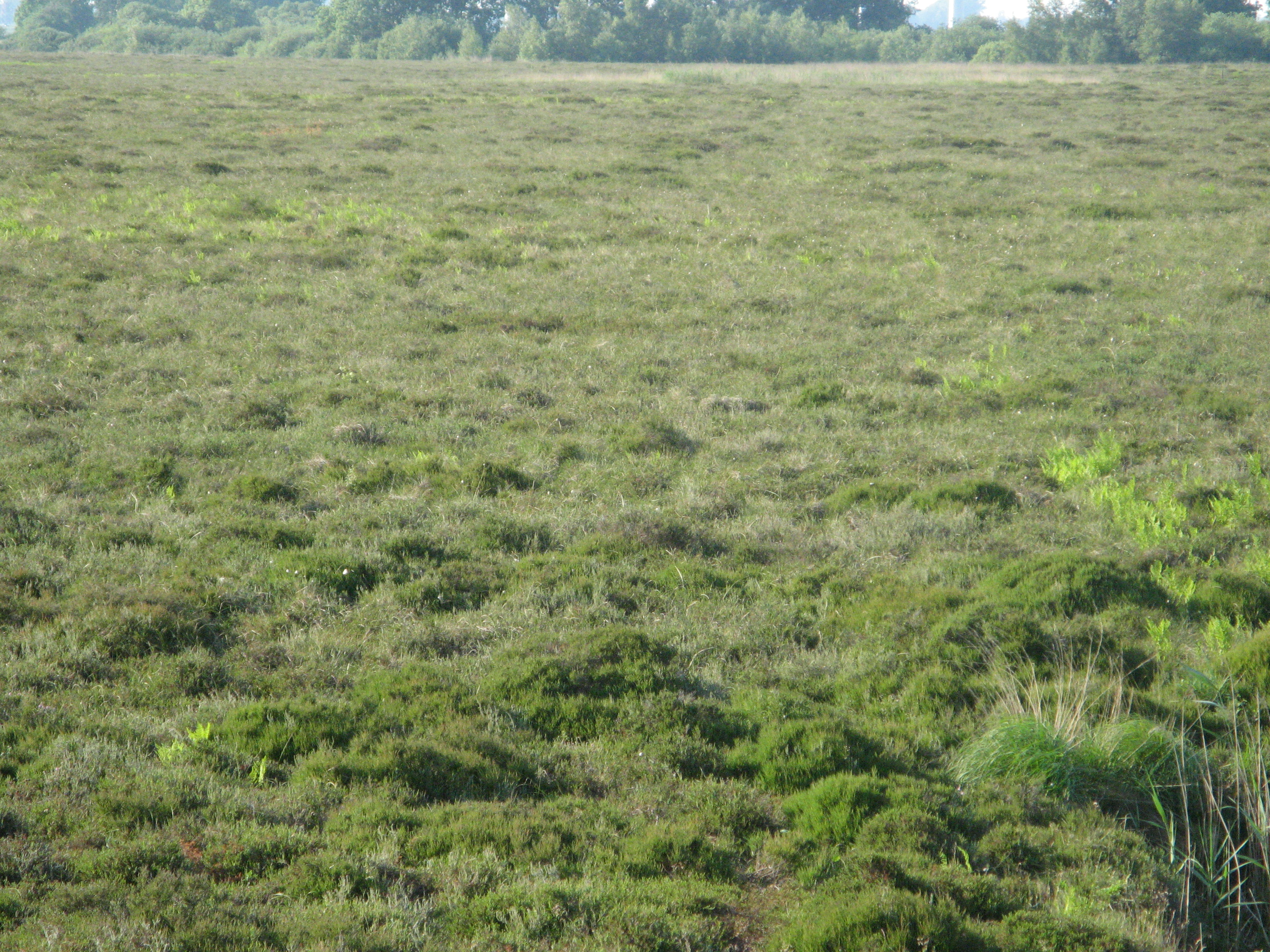 Naturschutzgebiet Weißes Moor in Neuenkirchen